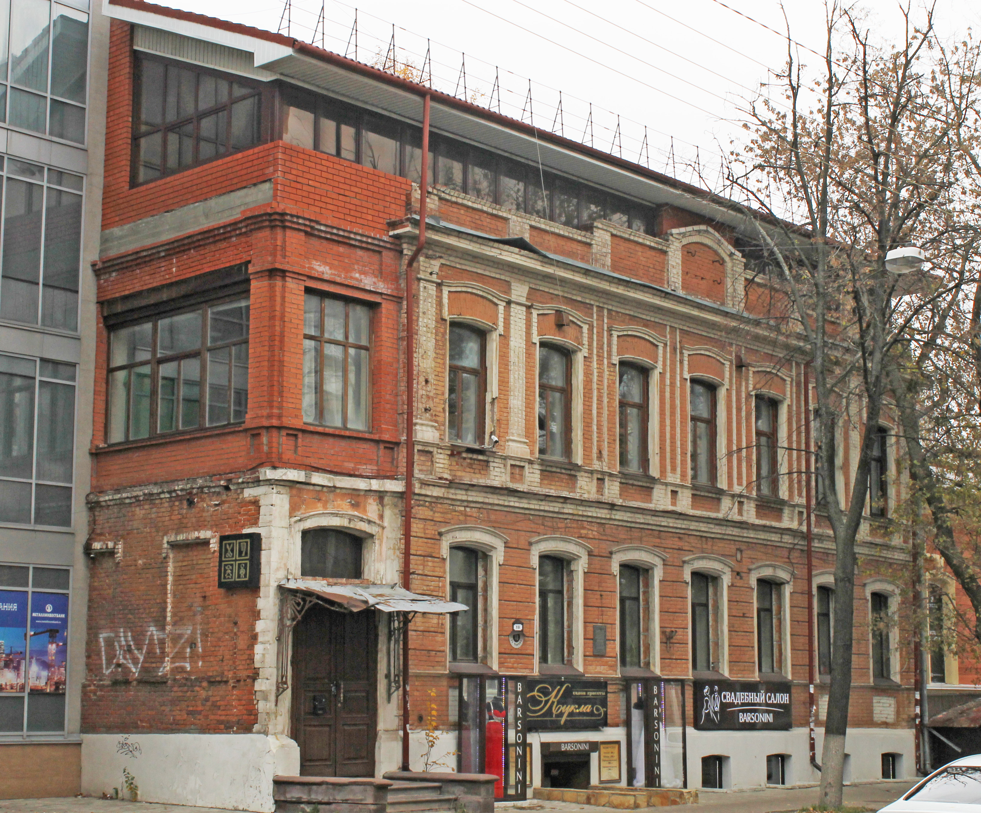 Здание земской управы. Дом, в котором с 1892 по 1893 гг. жил А.М. Горький: улица Минина, 18, Нижний Новгород, Нижегородская область